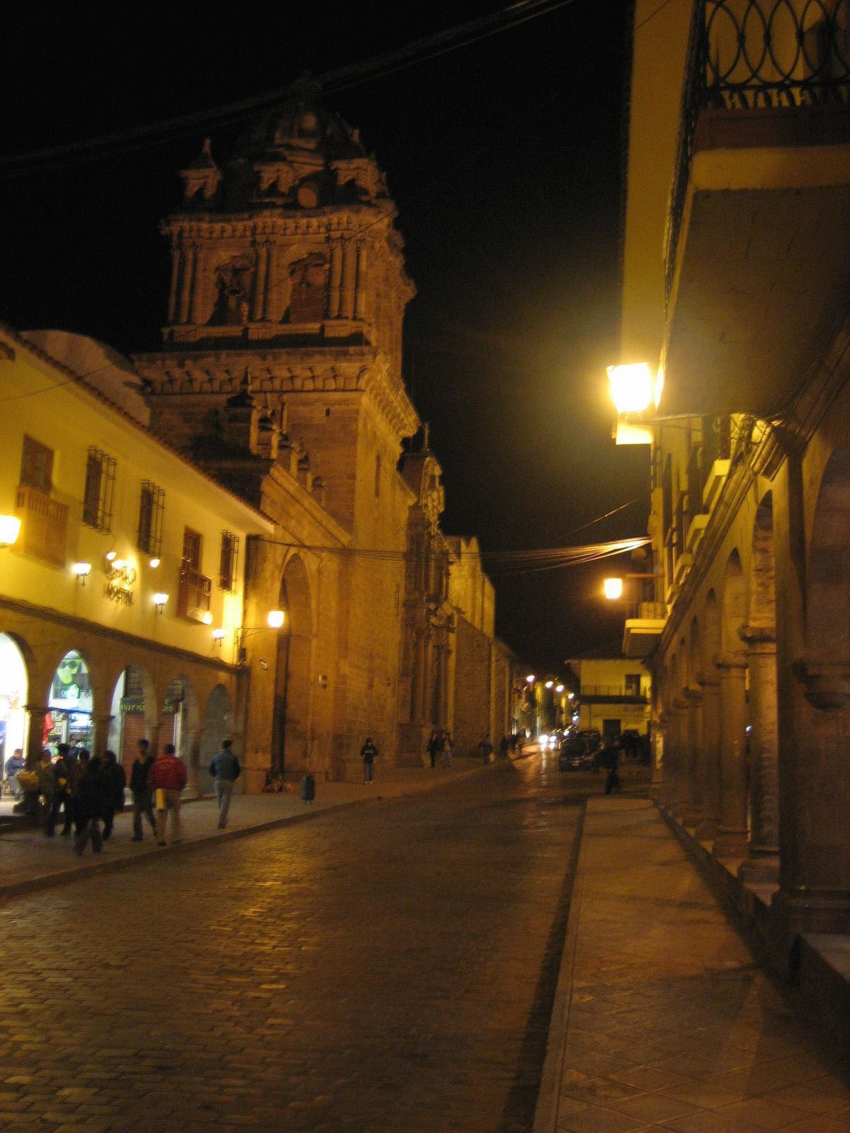 Calle cercana a la Plaza de Armas.Cusco